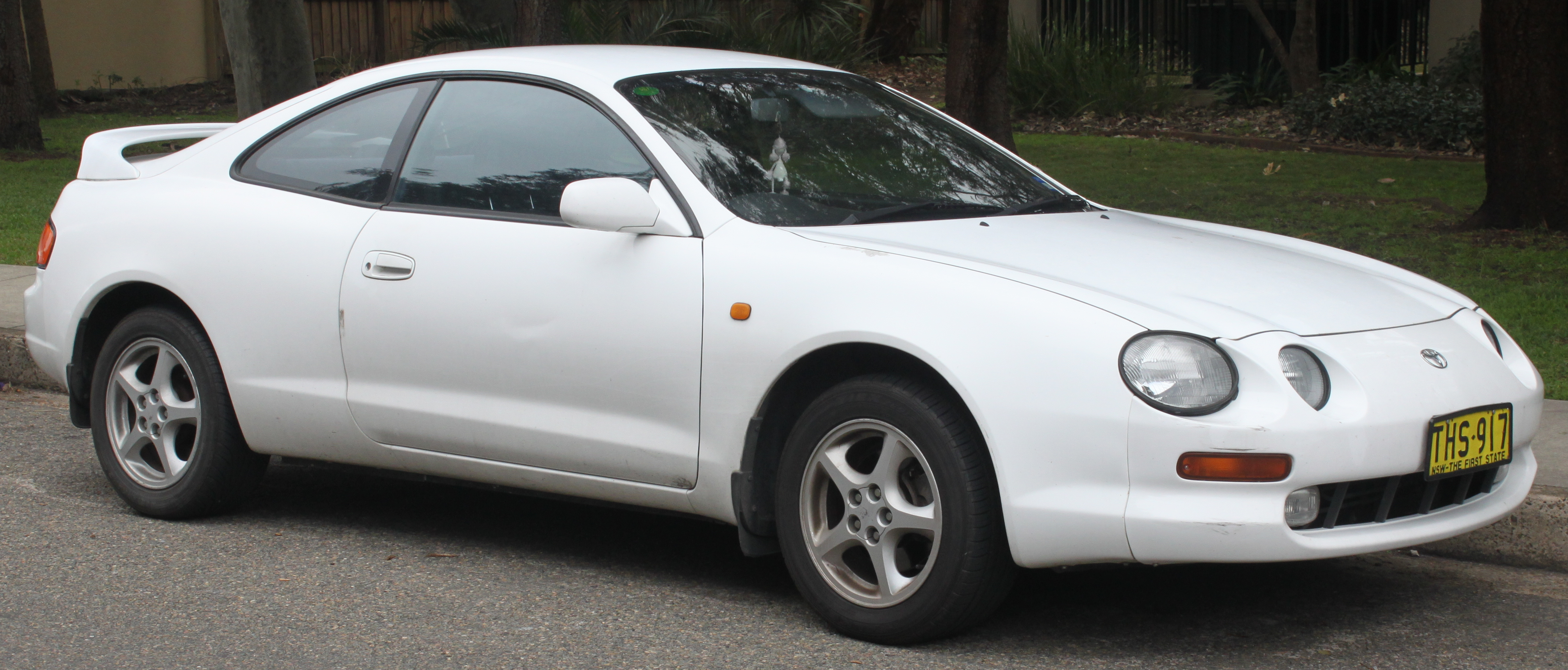 Toyota Celica ST204R ZR